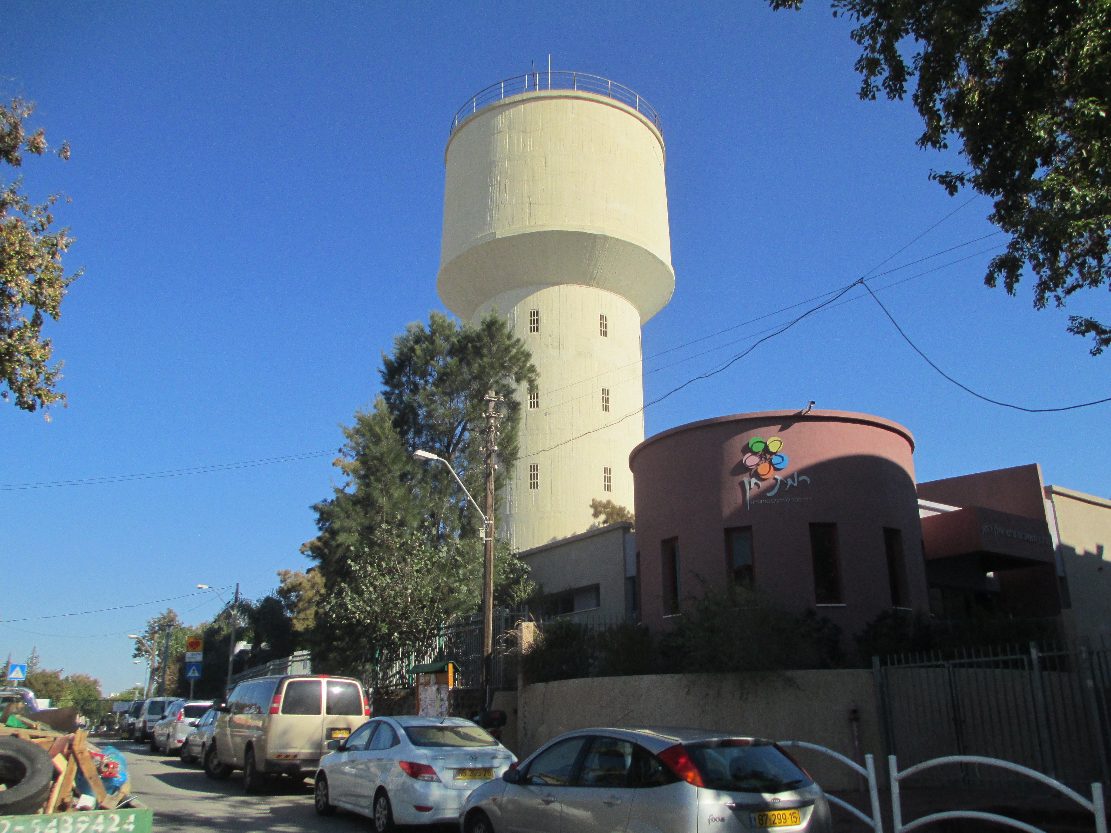 מגדל מים בשכונת רמת חן ברמת גן